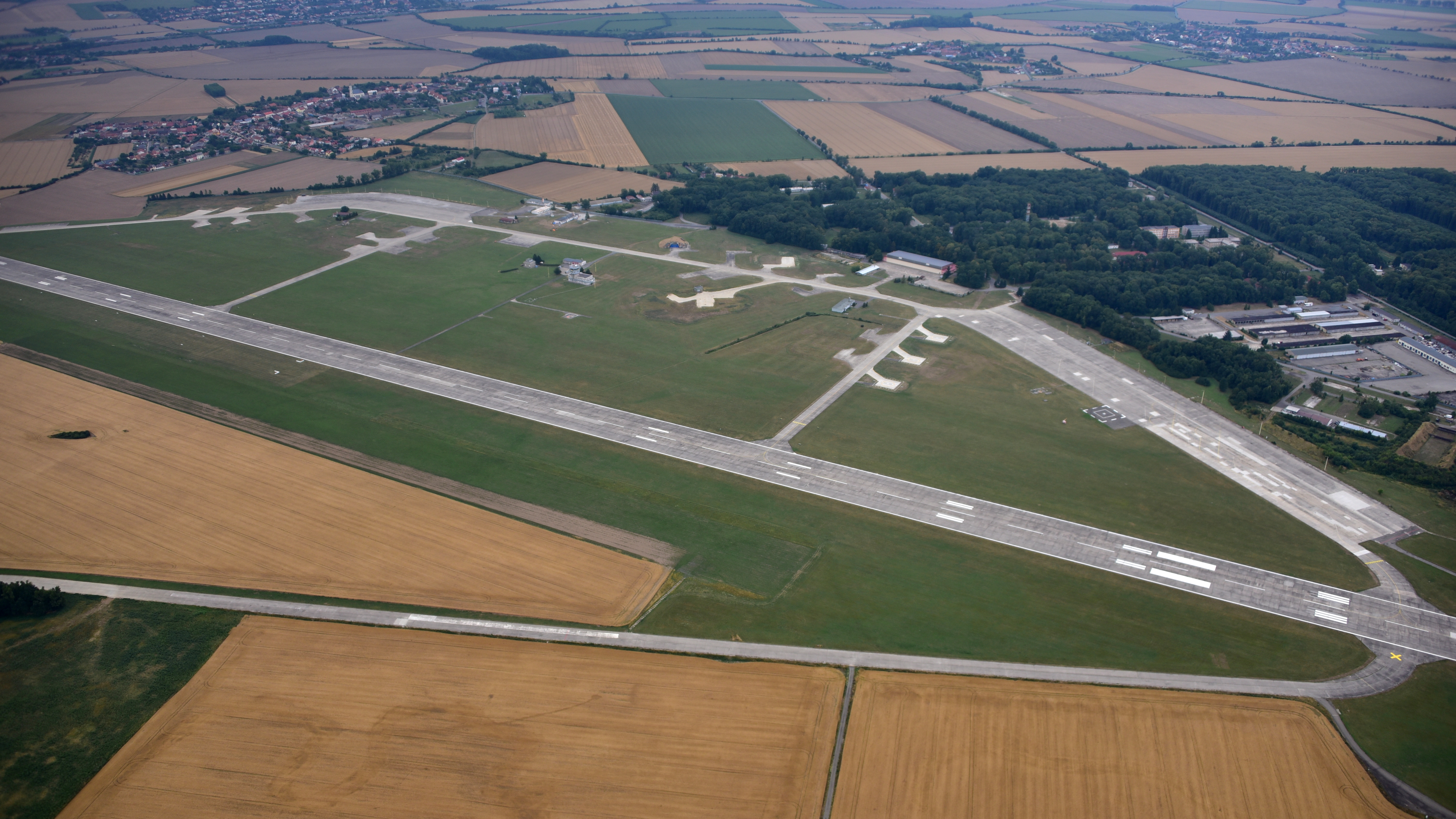 Letiště Přerov, Na Letišti 406/147, Bochoř, okres Přerov.